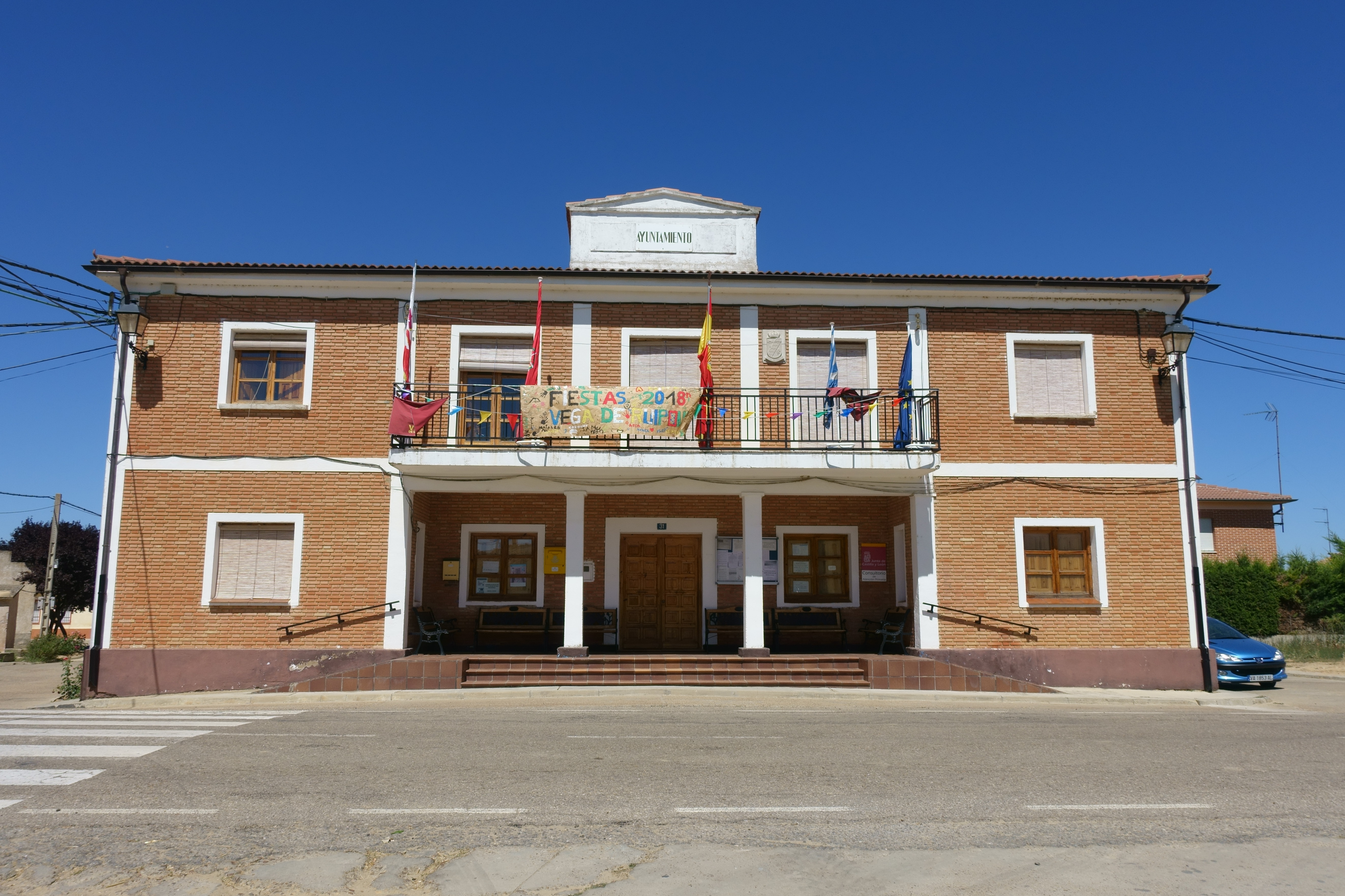 Casa consistorial de Vega de Ruiponce (Valladolid, España).